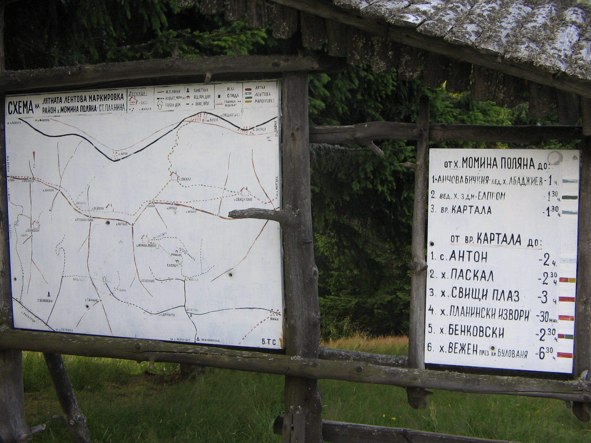 информационно табло пред хижа Момина поляна